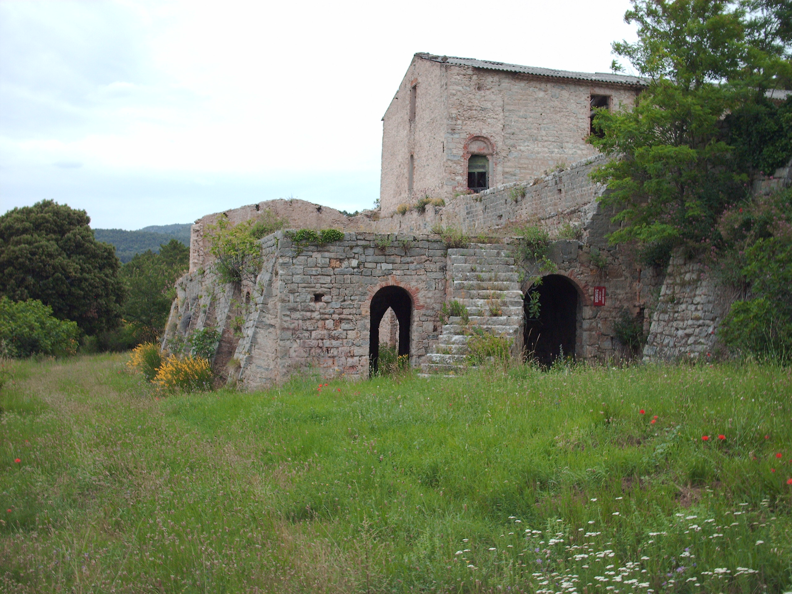 Bâtiment de l'ancienne commanderie templière du Ruou sur la commune de Villecroze, vue du Sud